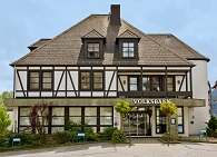 Volksbank Gebhardshain eG Hauptstelle